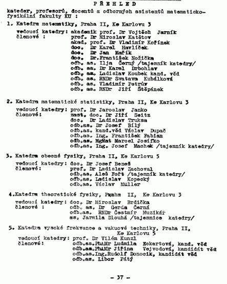 Sken historické Karolínky (dnes nazývanou Studijní plány, či Oranžová Karolínka MFF UK) z roku 1957 - Stránka 37. s výpisem a obsazením kateder.